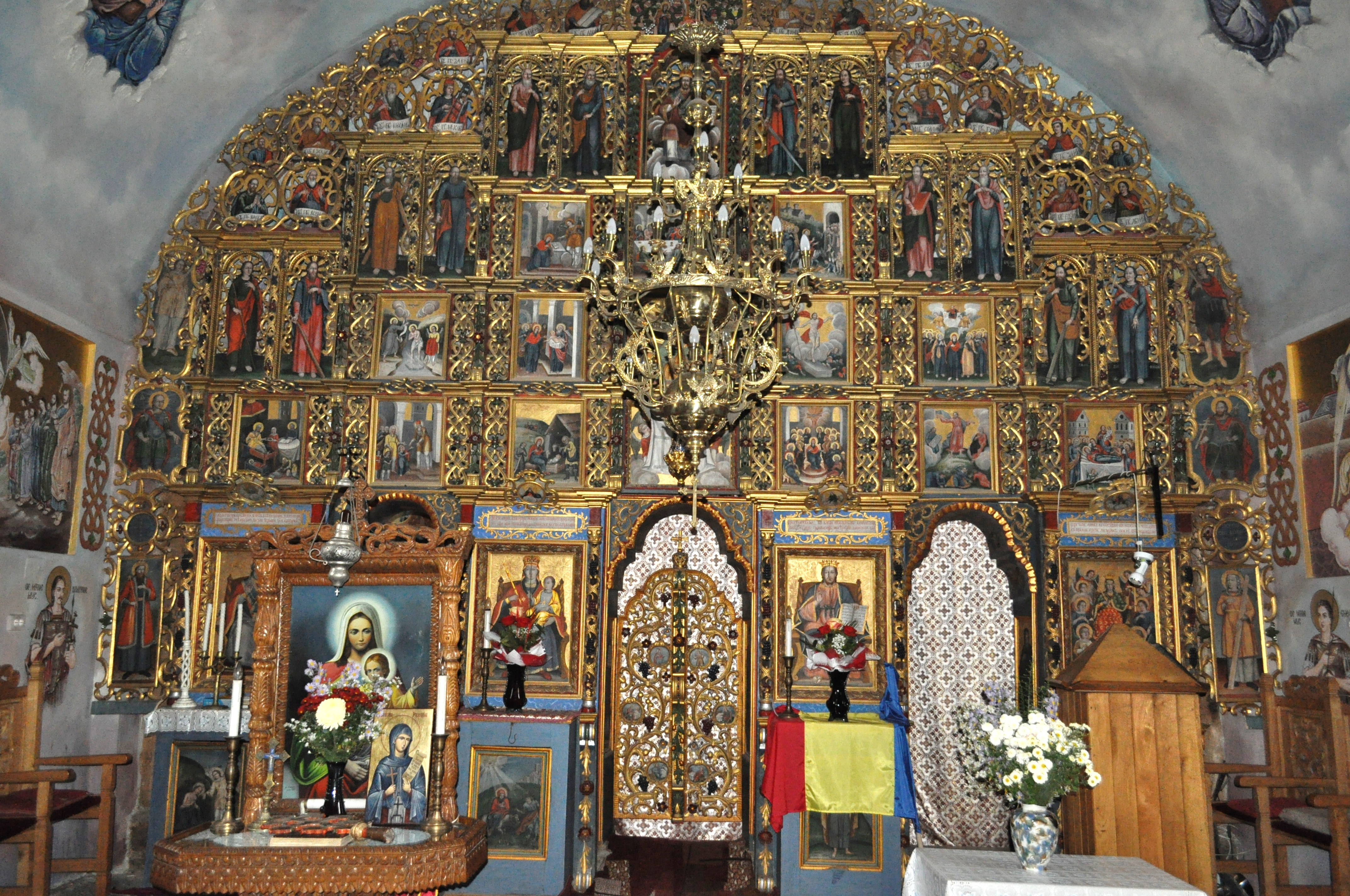 Biserica "Cuvioasa Paraschiva", sat Cetățele; comuna Șișești 01